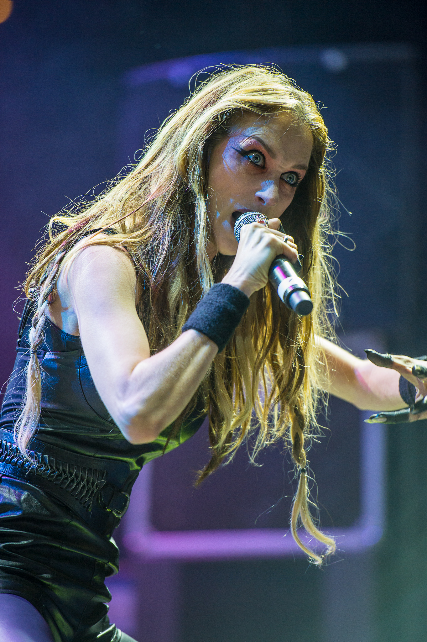 ARGO-Konzerte,Arena Nürnberger Versicherungen,Clubstage,Huntress,Jill Janus,Konzert,Livekonzert,Livemusik,Musik,RiP,Rock im Park 2014